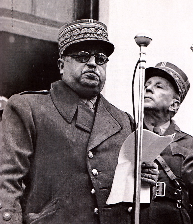 El general Oscar R. Benavides, presidente provisorio del Perú, transmitiendo un mensaje radial a la Nación en 1936